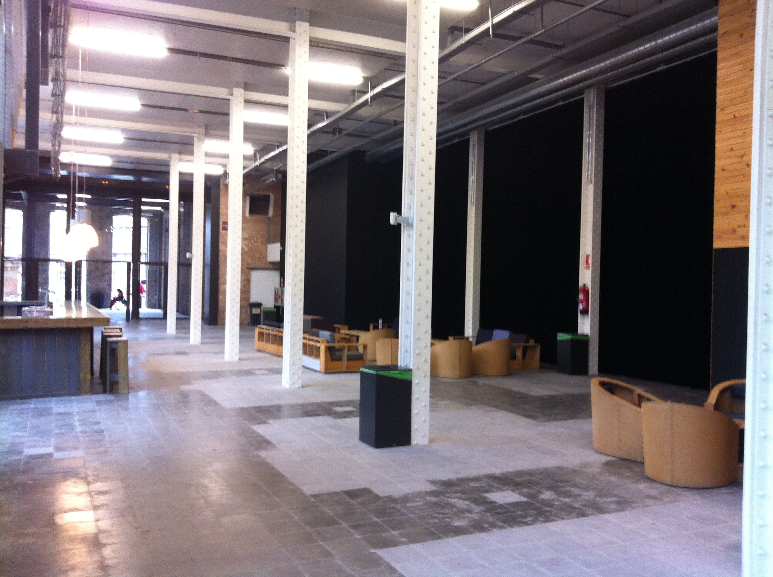 Fabra i Coats interiors